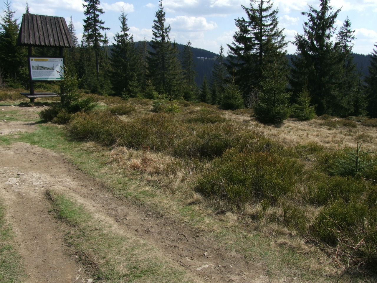 Polana Obidowiec (Gorce)